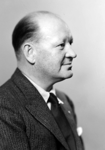 portrett, mann, teaterdirektør, brystbilde, profil.